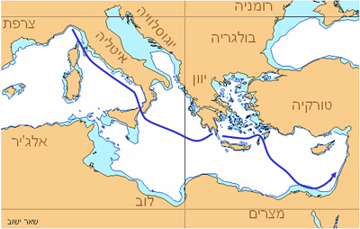 מסלול השיט של אוניית המעפילים שאר ישוב